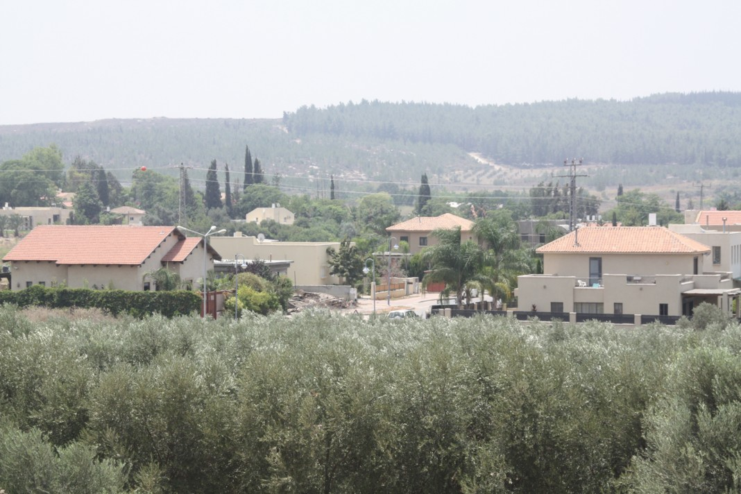 כפר בן-נון Kfar Bin Nun